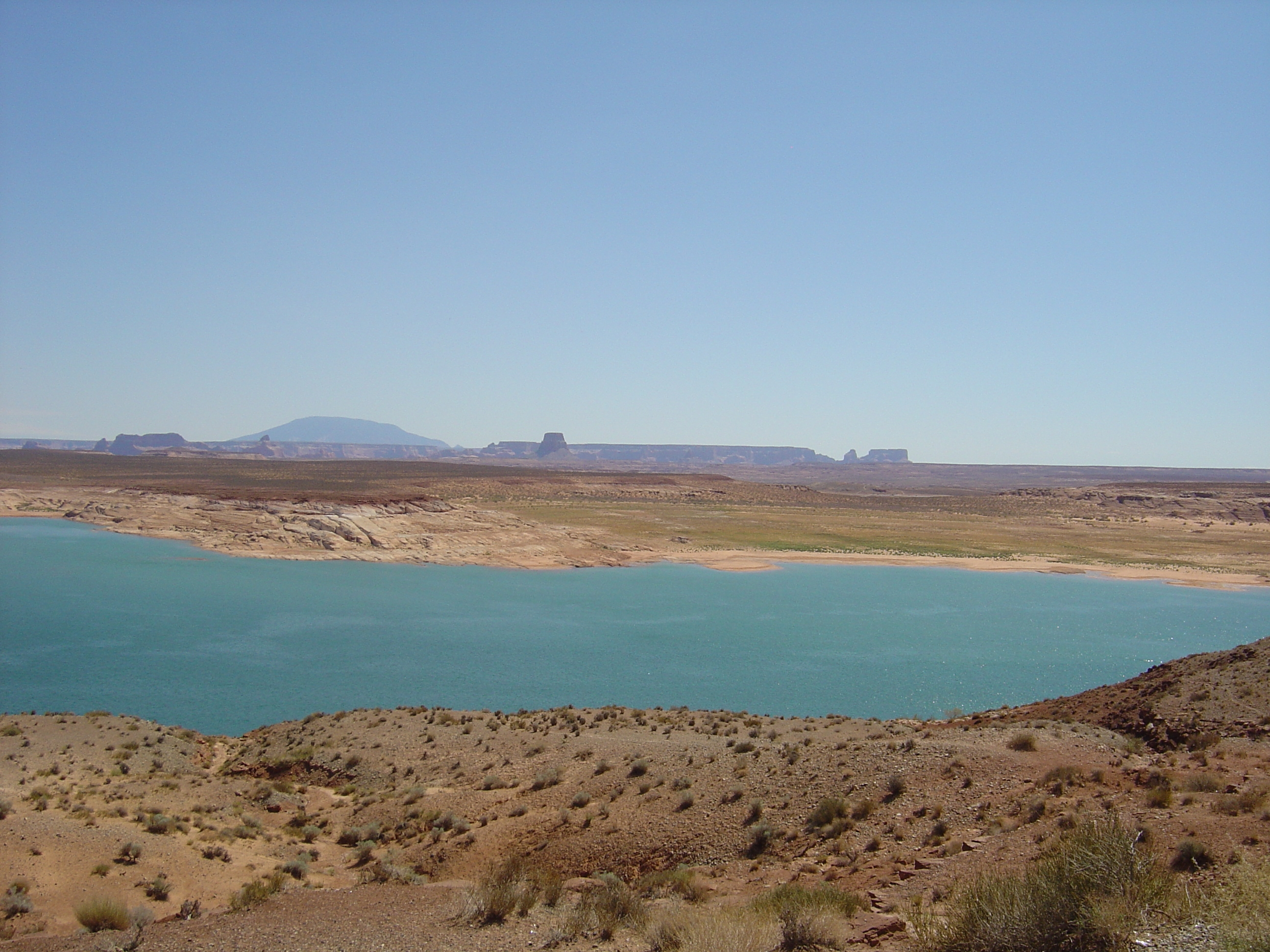 Ausblick auf den Lake Powell